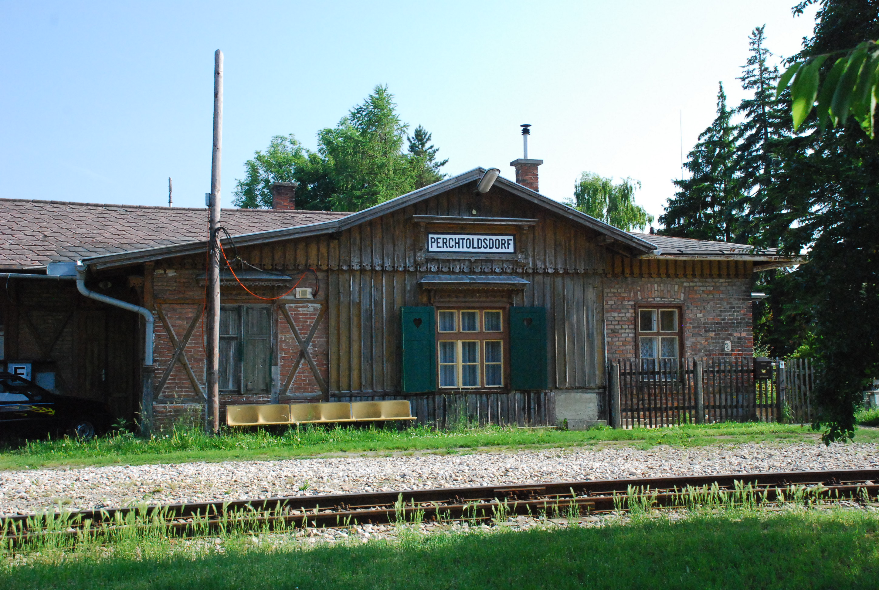 Bahnhof Perchtoldsdorf an der Kaltenleutgebener Bahn